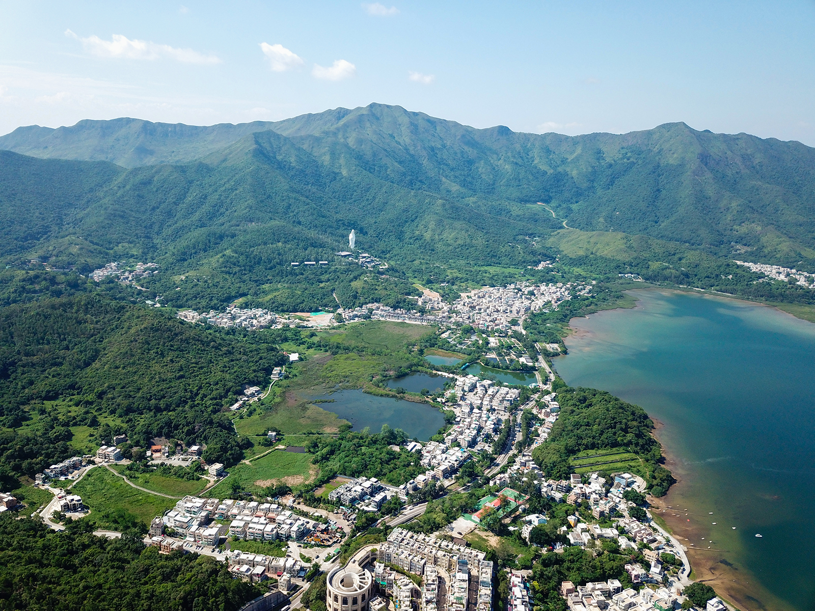 Shuen Wan